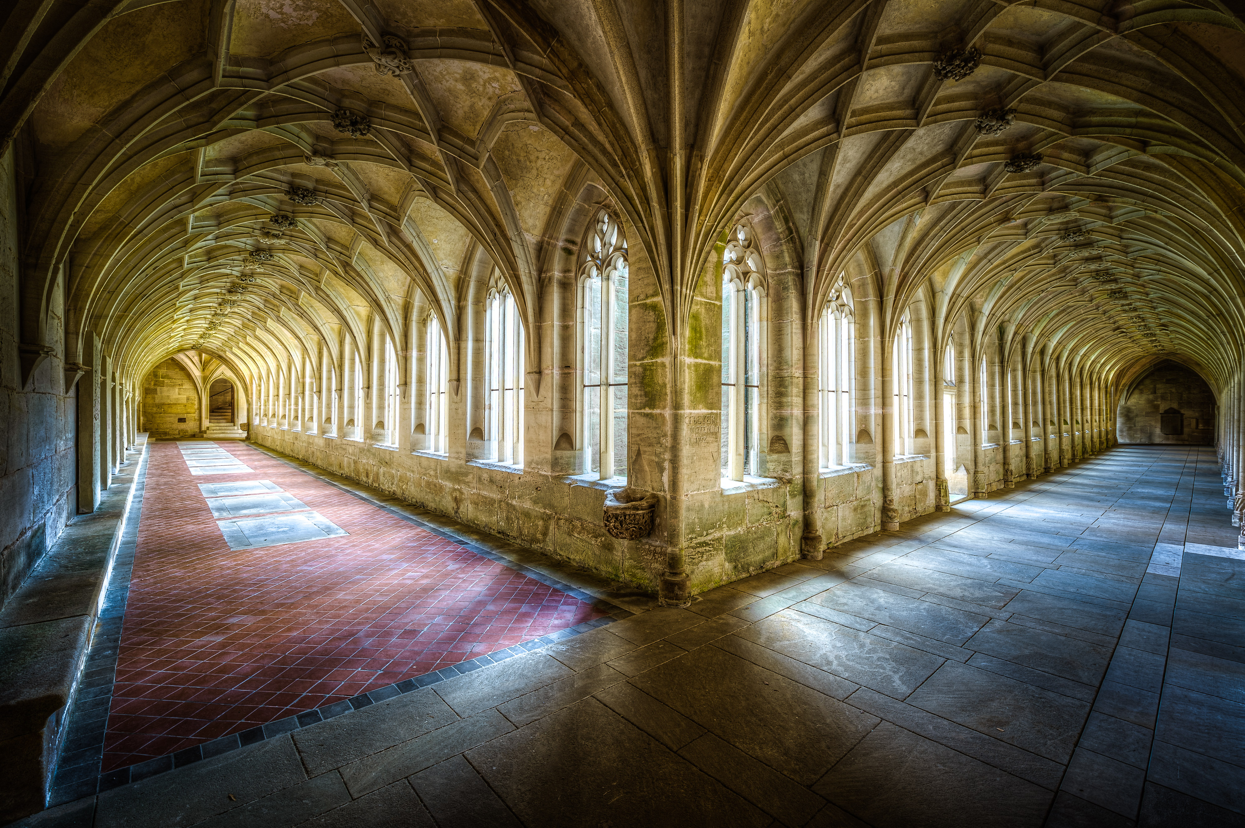 Kreuzgang des Klosters Bebenhausen